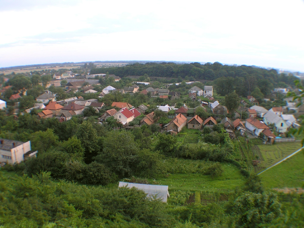 Vynohradiv